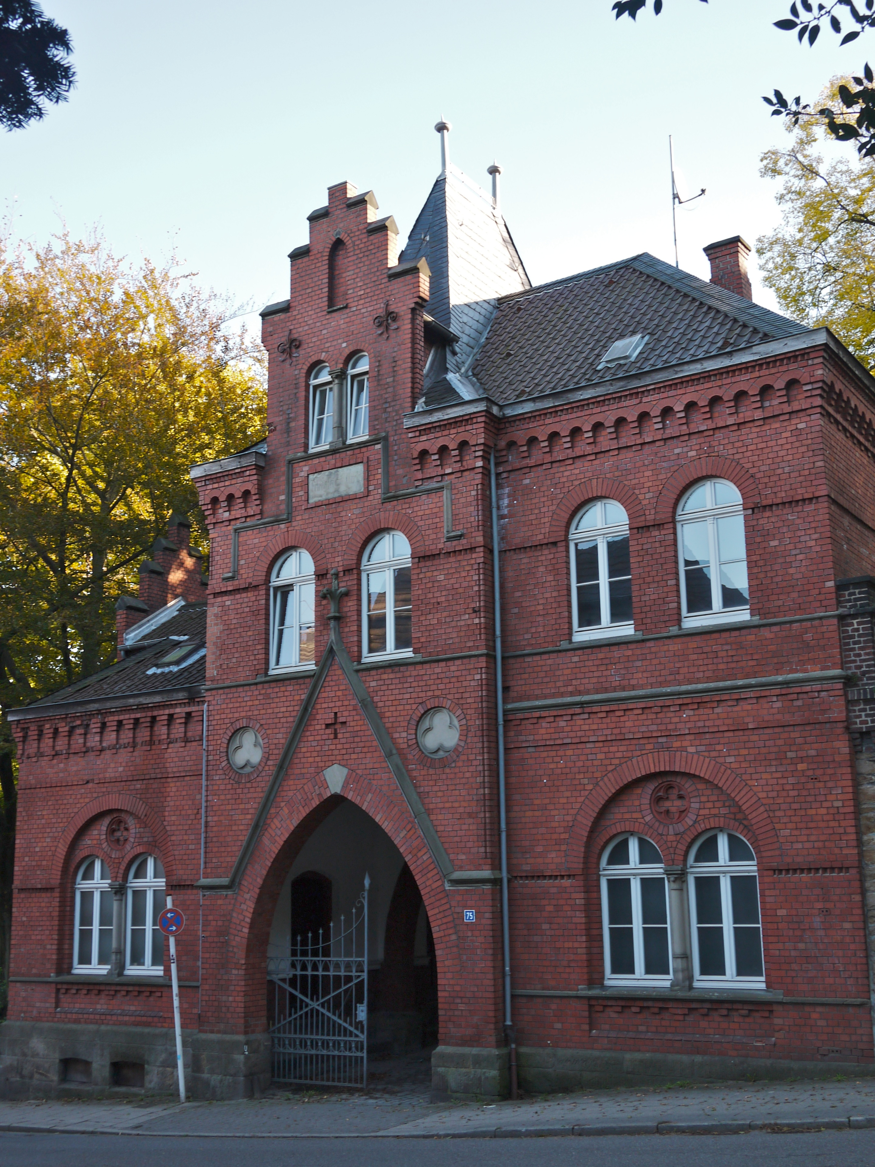 Portal Alter Friedhof, Kettwiger Straße 75, Mülheim an der Ruhr This is a photograph of an architectural monument.